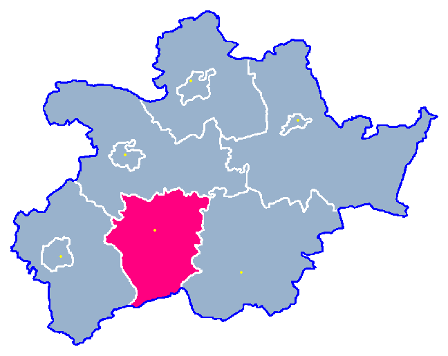 Locator maps for communes in województwo zachodniopomorskie : Krzęcin gm.png (podział na gminy)